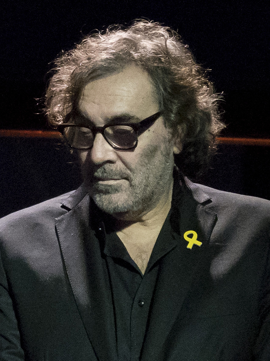 Jordi Cabré s'endú el 59è Premi Sant Jordi de novel·la amb 'Digues un desig'. El 21è premi Mercè Rodoreda de contes i narracions és per 'El país dels cecs' de Víctor García Tur i el mallorquí Carles Rebassa s’endú el premi Carles Riba de poesia que enguany arriba a la 60a edició, amb l’obra 'Sons bruts'. La maresmenca Núria Franquet guanya el 56è premi Josep M. Folch i Torres de novel·les per a nois i noies amb el seu primer llibre, La Liang dins del quadre. I Maite Carranza ha estat guardonada amb el 45è Premi Joaquim Ruyra de narrativa juvenil amb L’alè del drac.